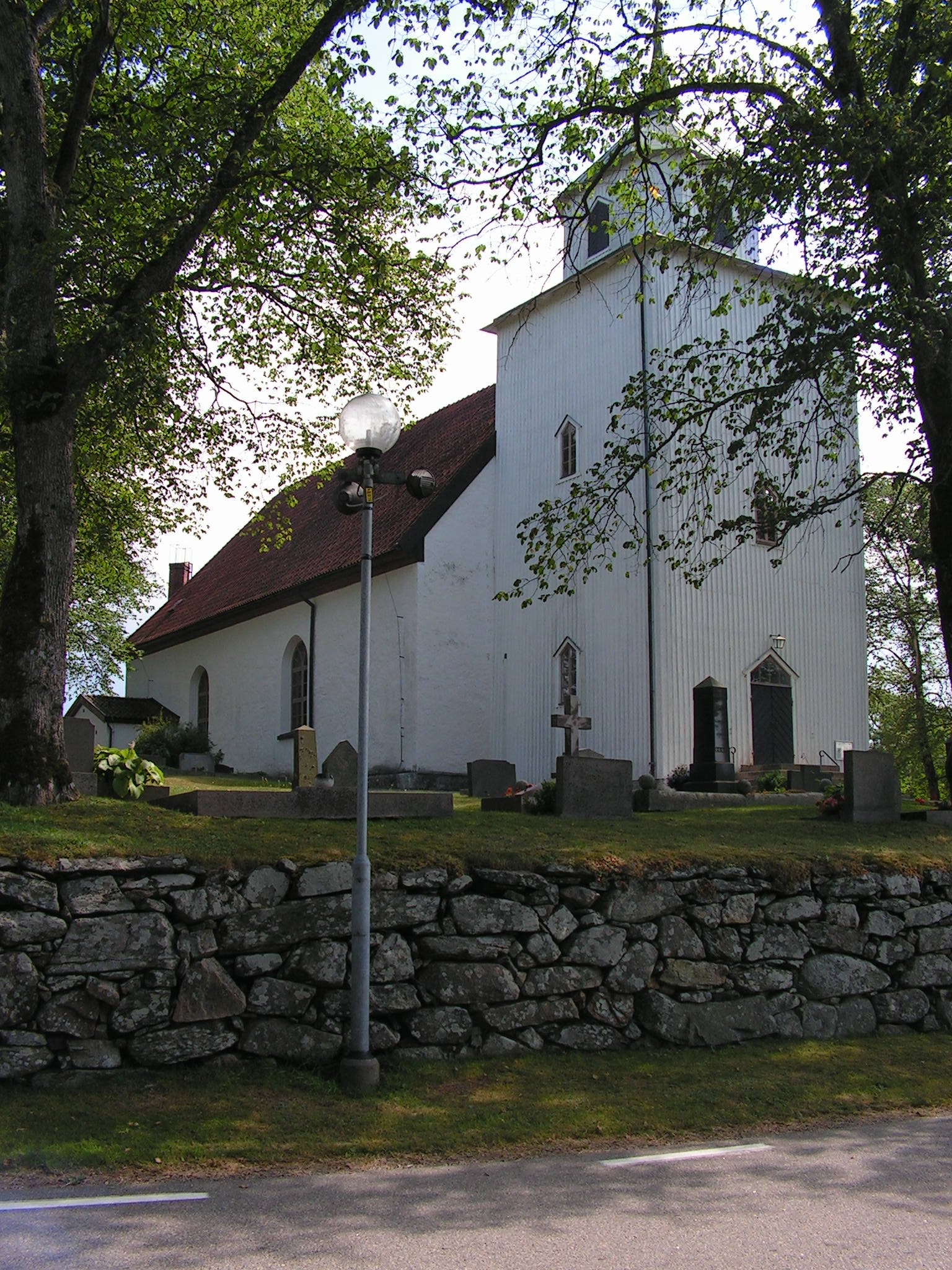 Svarteborgs kyrka, Munkedals kommun, Sverige